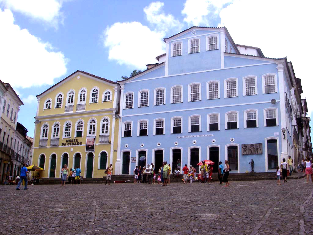 Square in Salvador, Bahia, Brazil